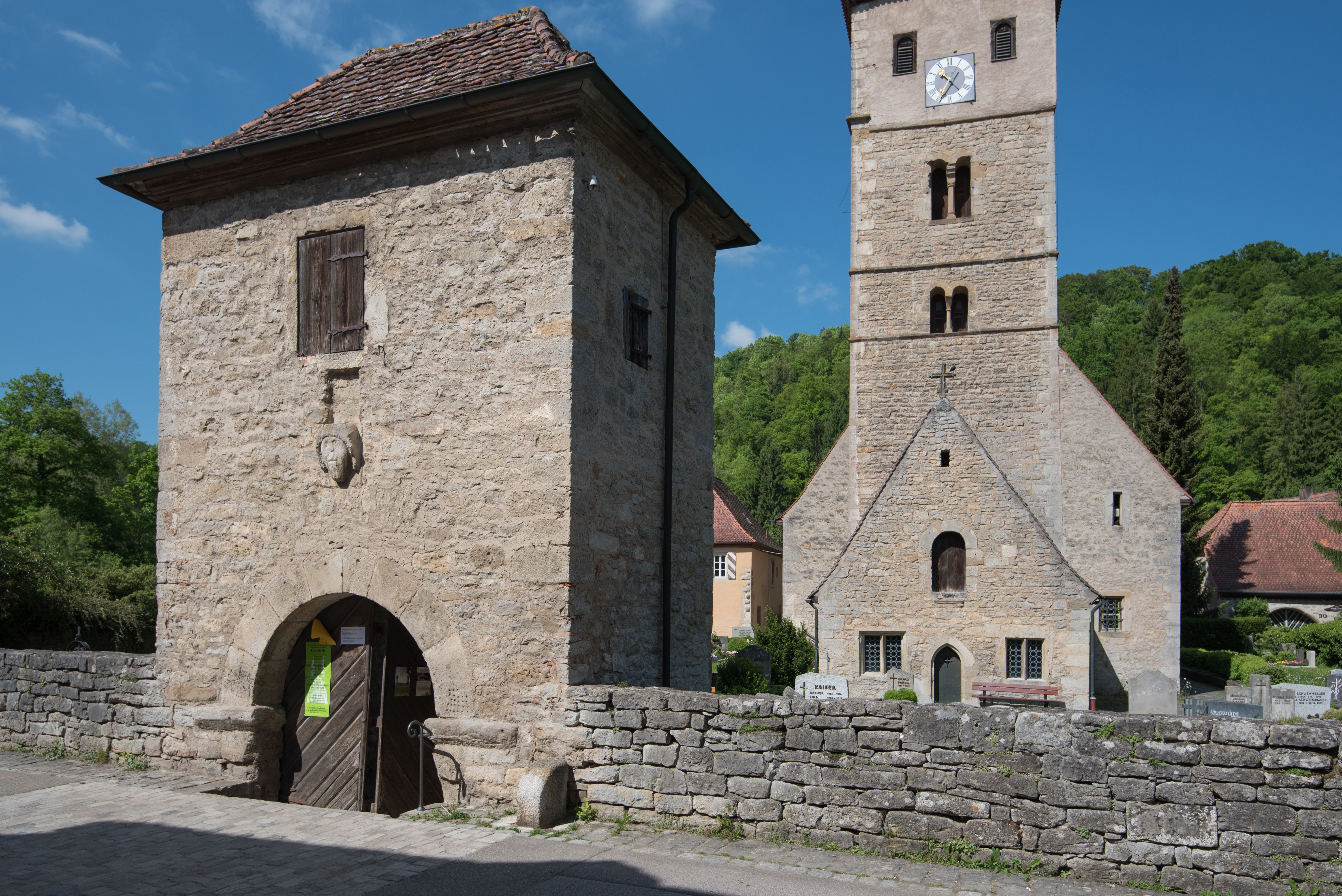 Rothenburg ob der Tauber, Detwang 31, Torhaus